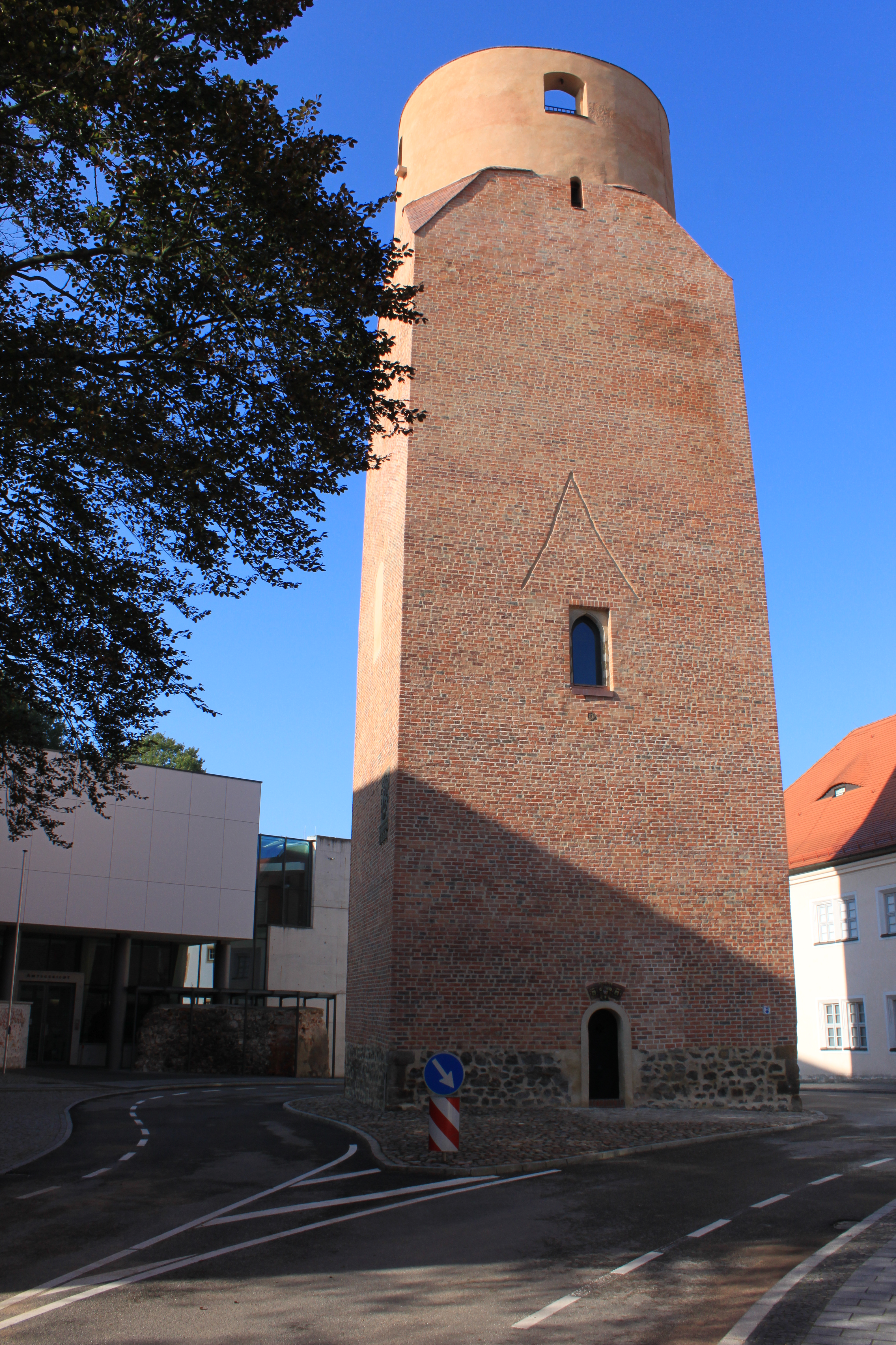 der restaurierte Lubwartturm 2011, über dem Hocheingang die Reste des einstigen Dachanbaues, darunter ein erhaltener Holzbalkenrest im Mauerwerk.